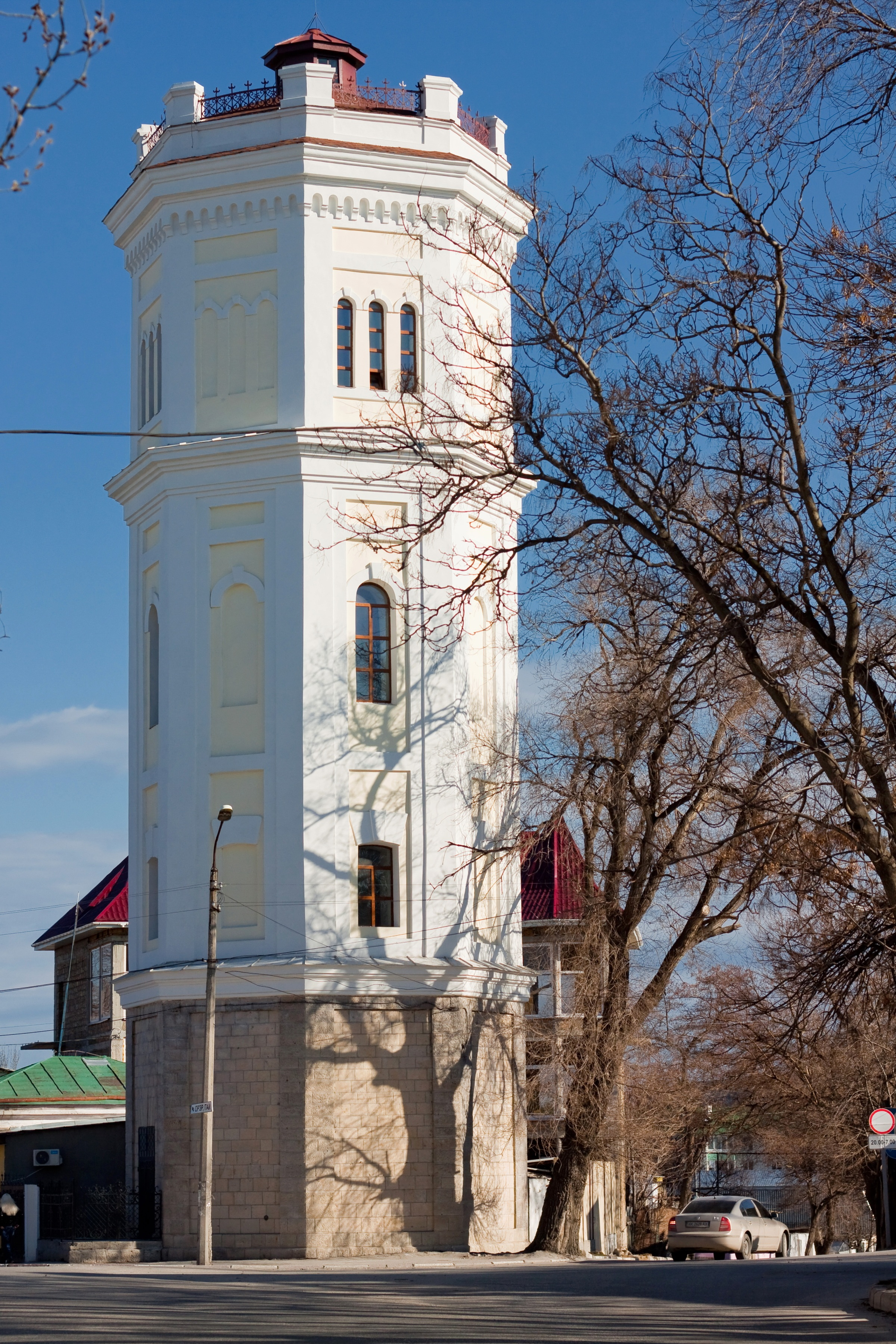 Феодосія, вул. Російська, 77а, літер "А"